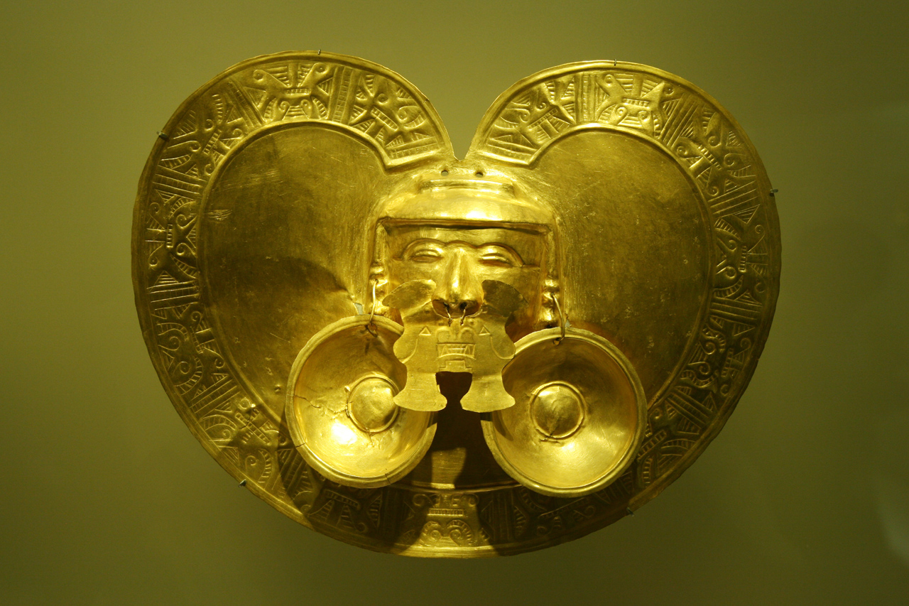 Musée del Oro